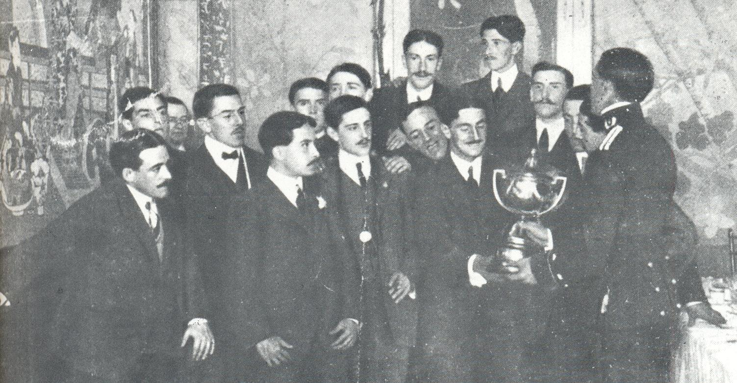 Club Ciclista campeón 1909